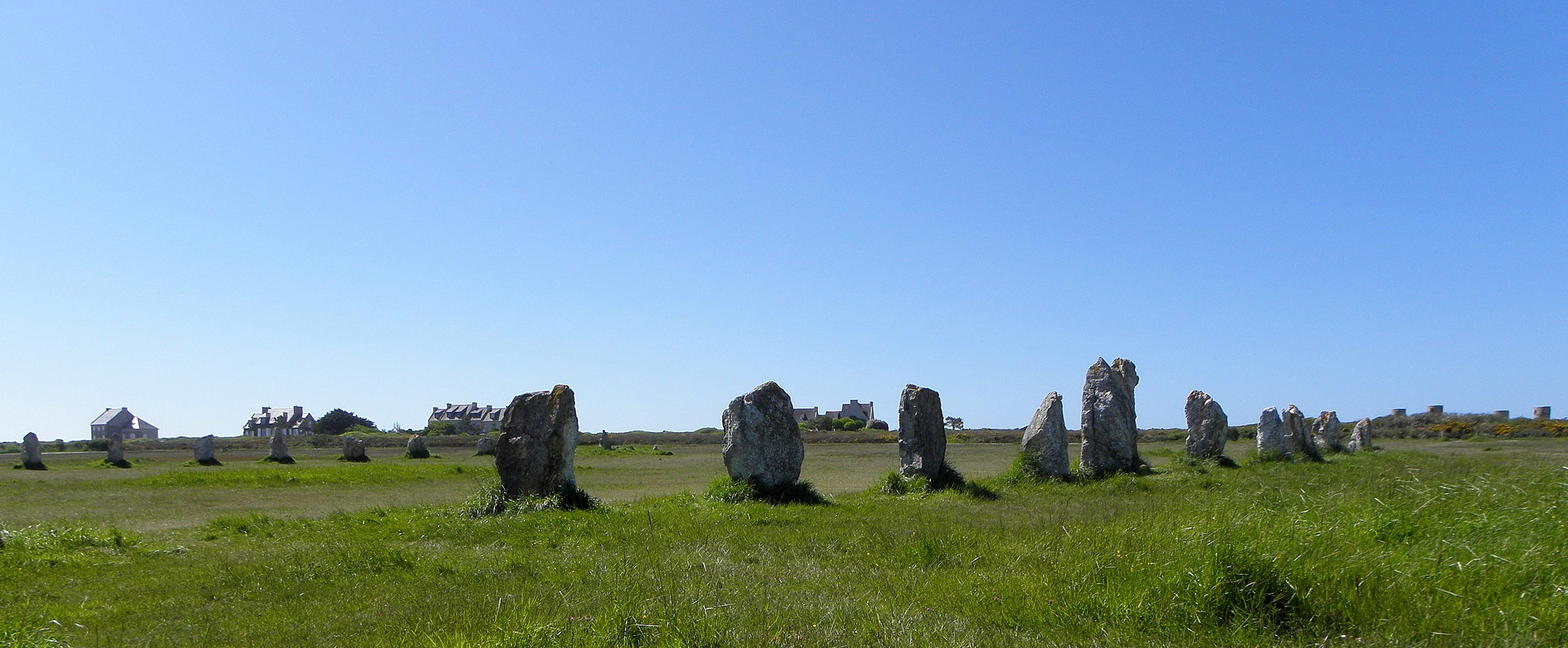 Alignements de Lagatjar en Camaret-sur-Mer (29).